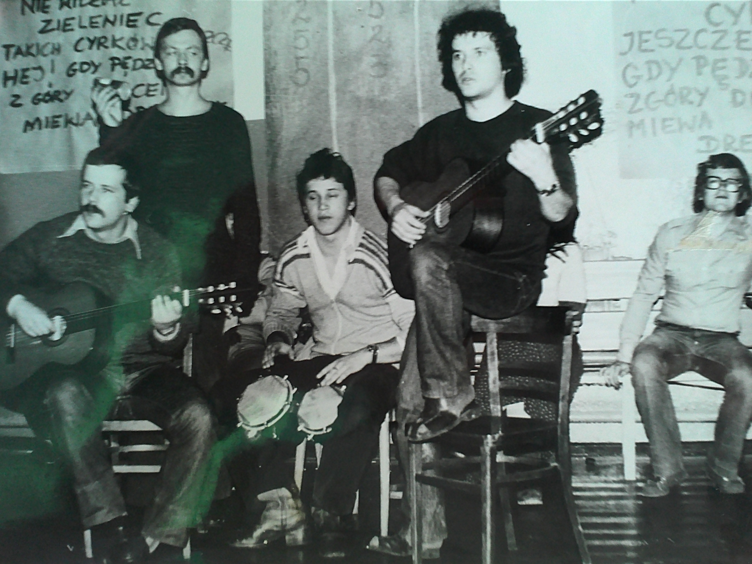 Występ zespołu poezji śpierwanej PONAD NAMI. Od lewej: Jerzy Mucha, Tadeusz Hołowiński, Krzysztof Skorupski, Janusz Cedro oraz Witold Palusiński.